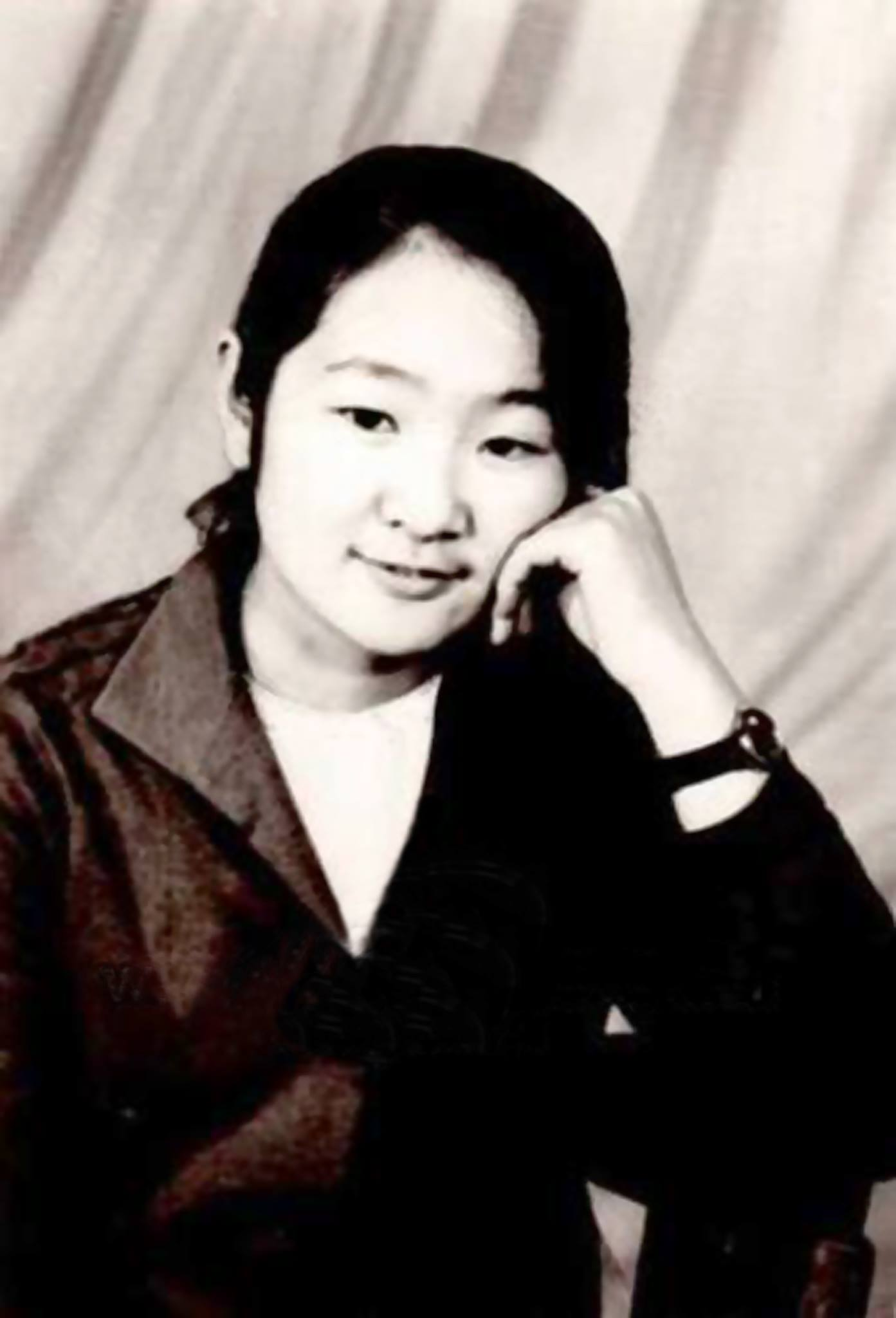 Монгол: Онц сурлагатан